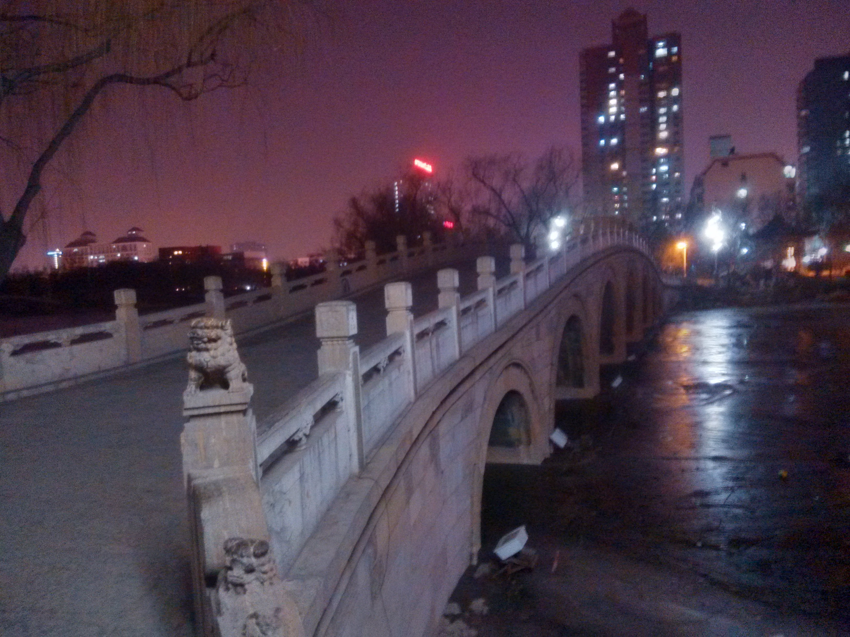 连接迎泽公园迎泽湖东西两岸的主要通道——七孔桥。摄于七孔桥的东侧。